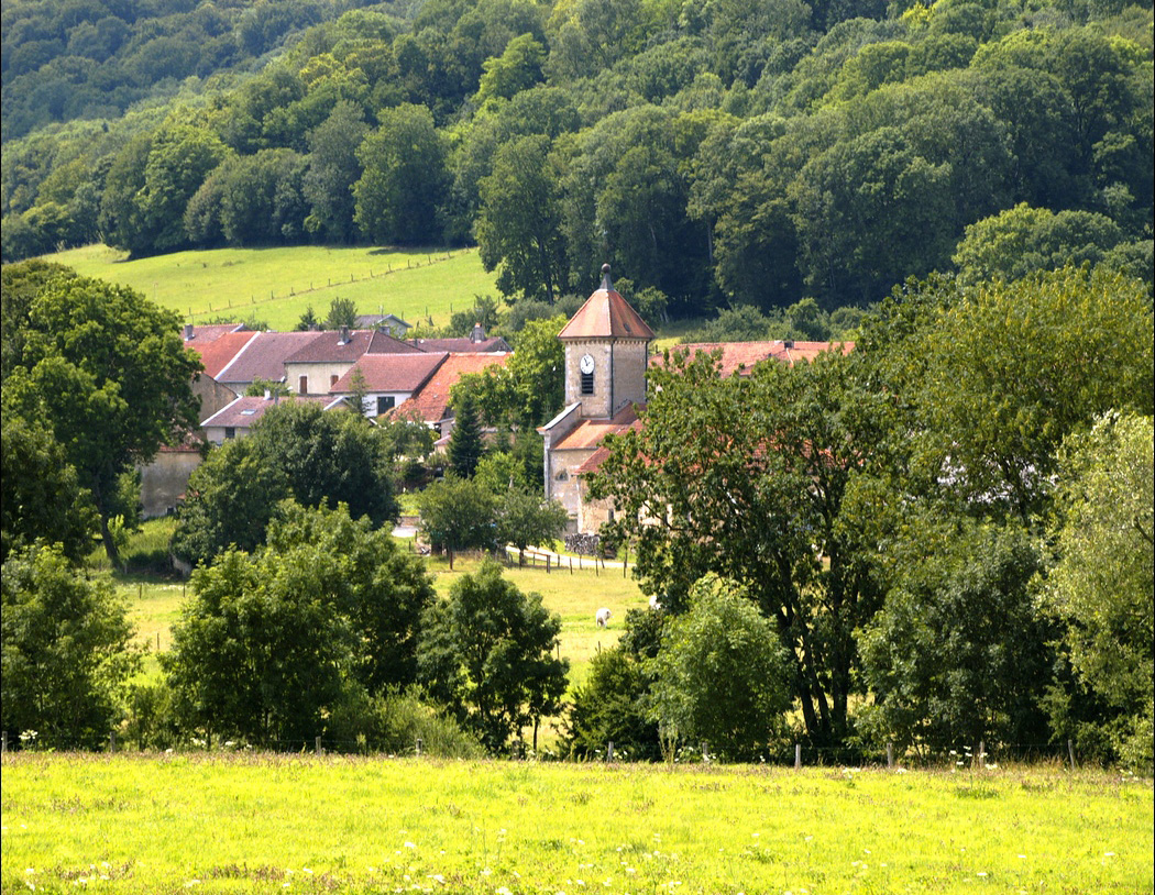 Sommerécourt (Haute-Marne)